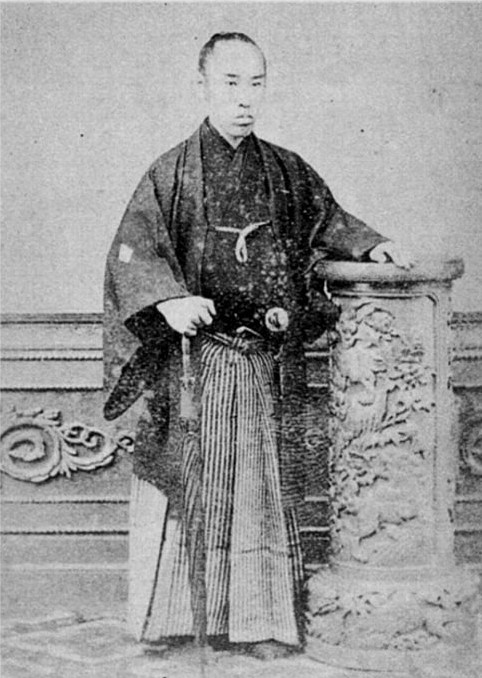 近衛忠房の肖像写真。